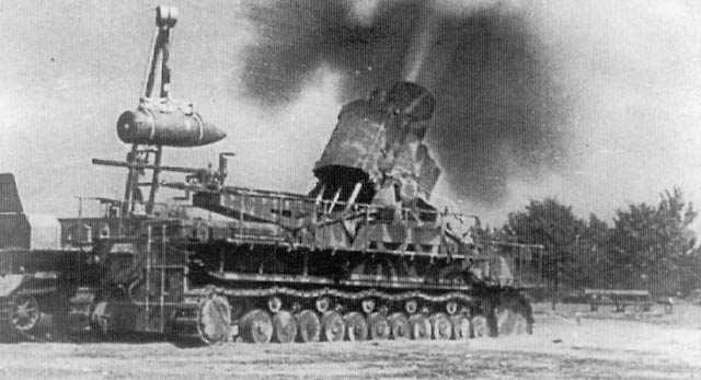 Gerät 040 Karl-Mörser Ziu kal. 600 mm